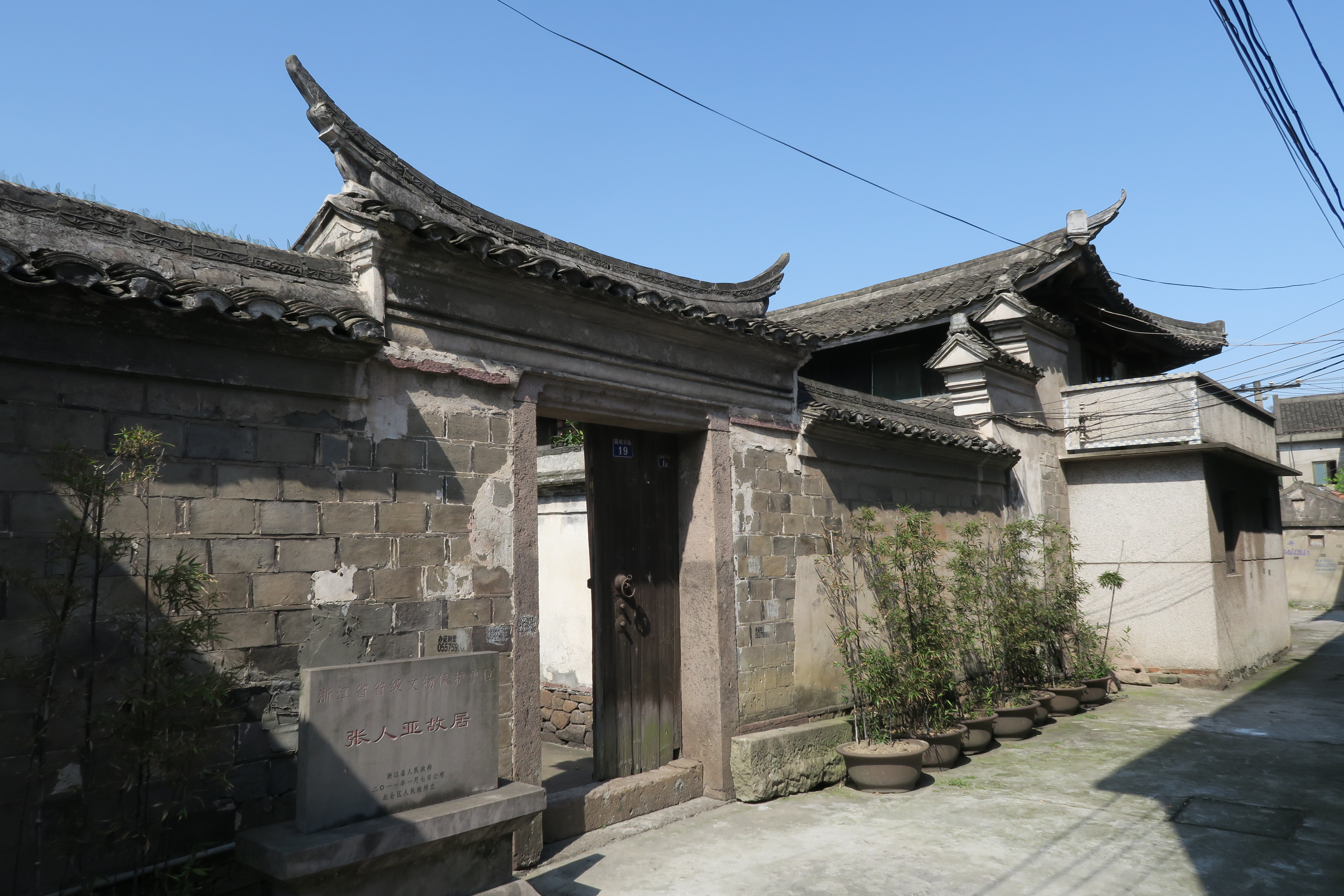 北仑张人亚故居